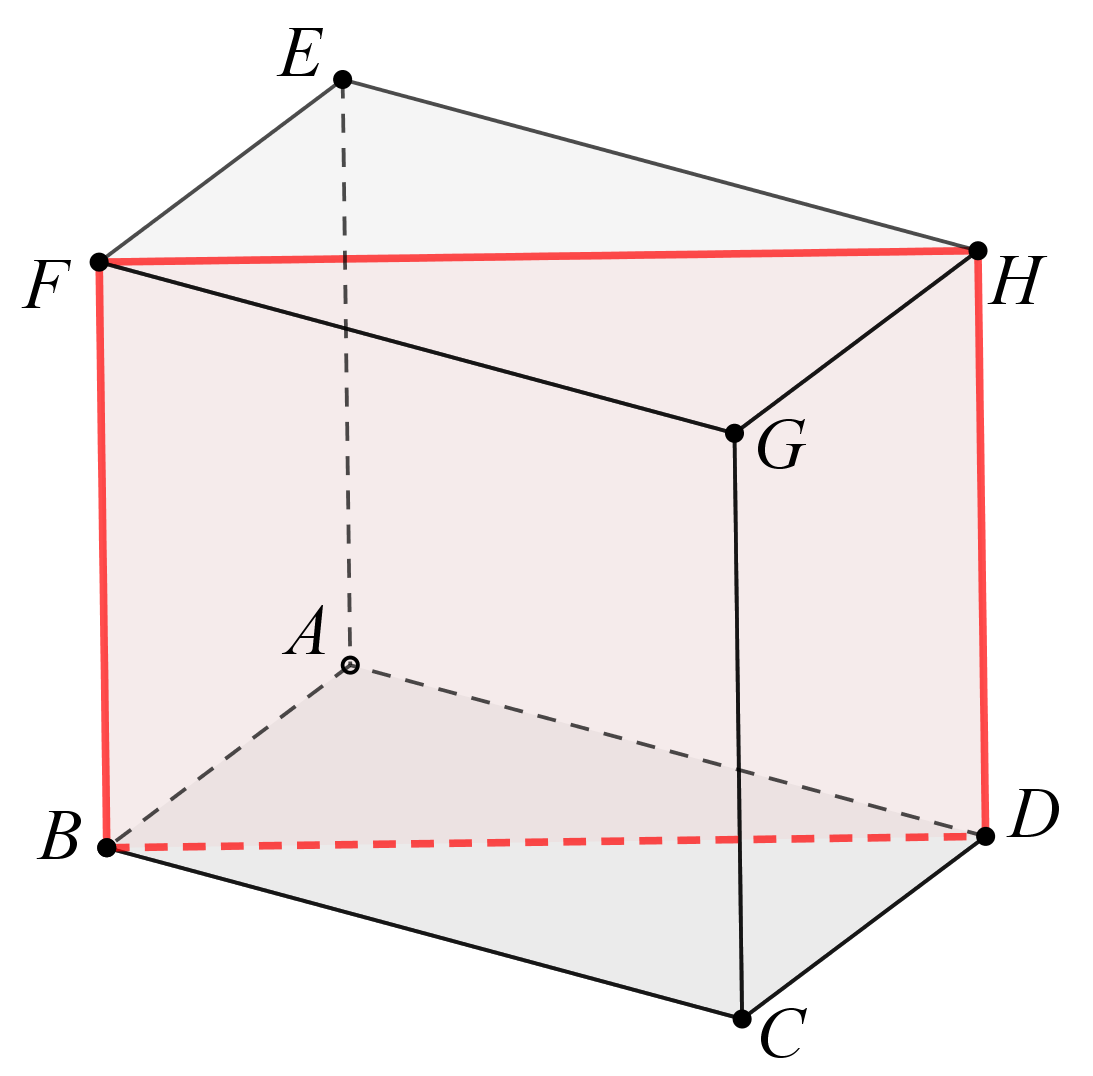 aanliggende veelvlakken